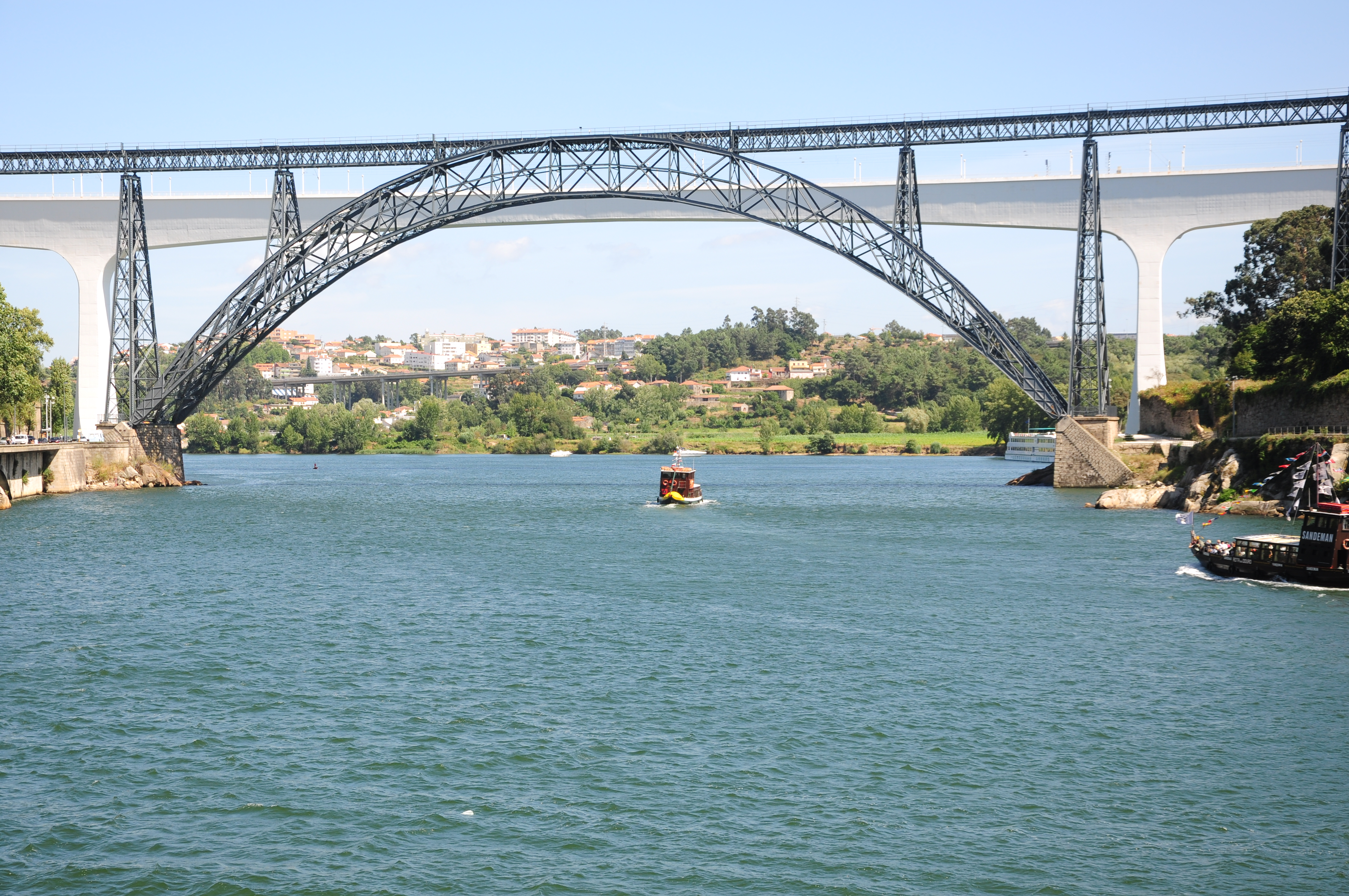 Ponte D. Maria Pia This file was uploaded for Wiki Loves Monuments in Portugal with the unique identifier 70405.